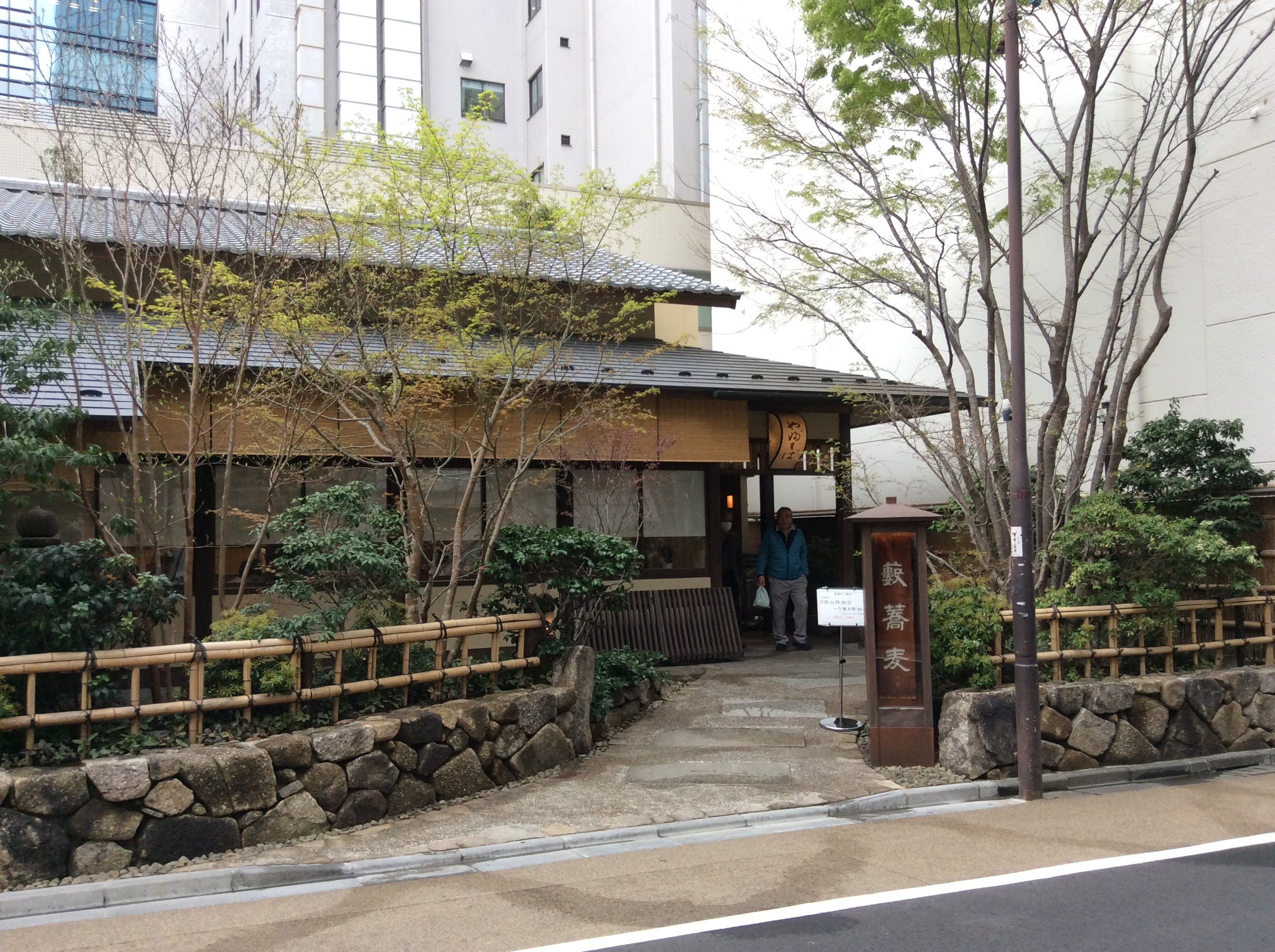 かんだやぶそば